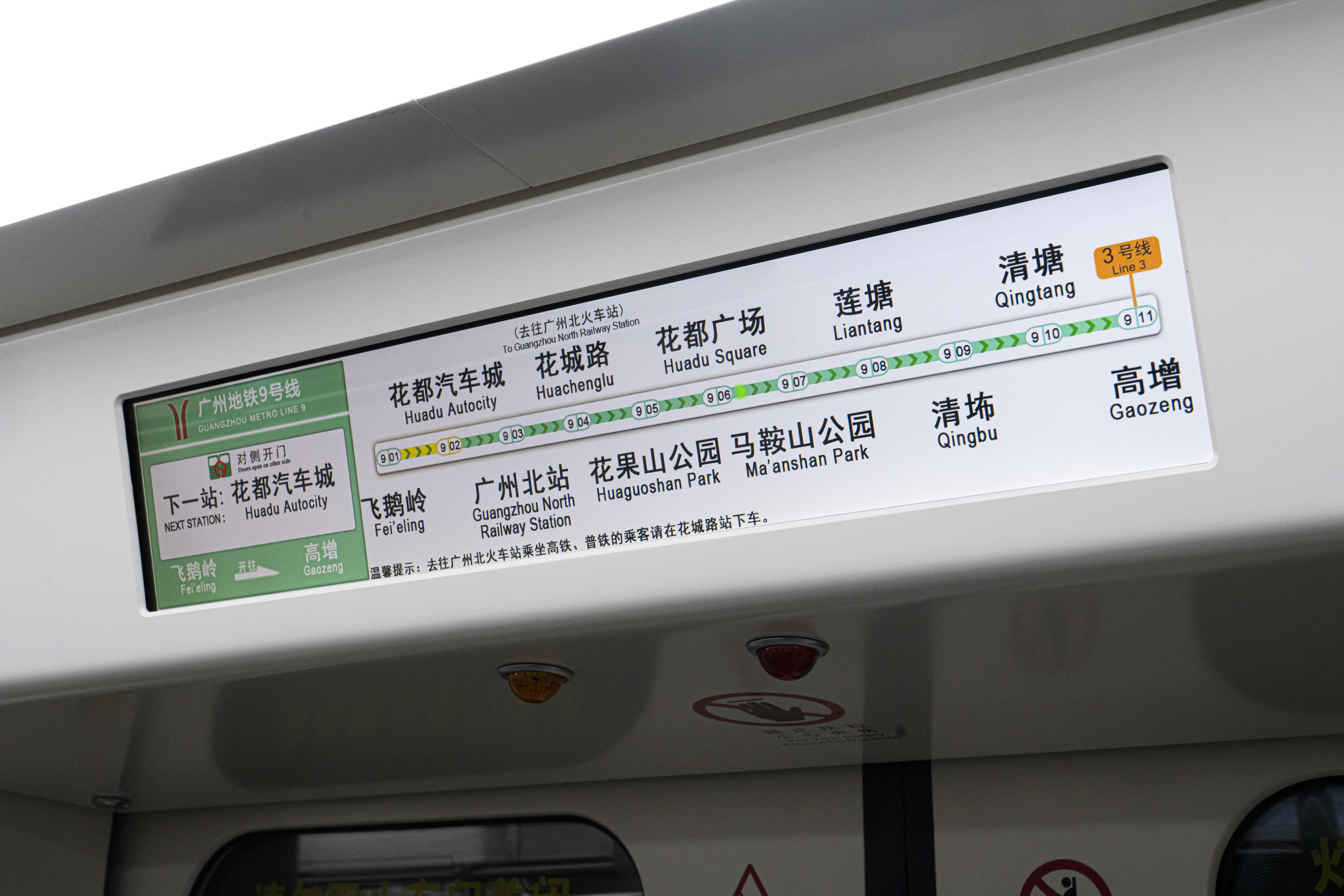 9号线列车车内的LCD显示屏